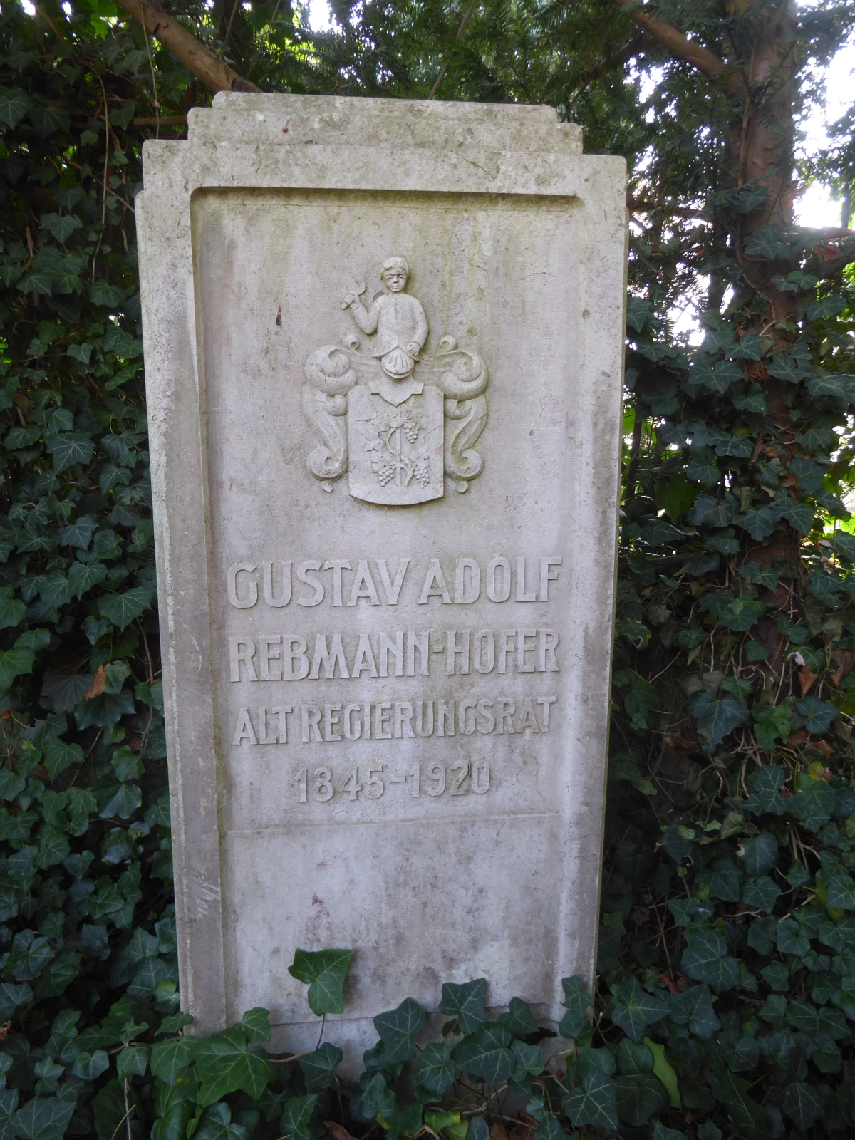 Gustav Adolf Rebmann-Hofer (1845–1926) Alt Regierungsrat, Grab auf dem Friedhof Liestal. Standort: Feld LP